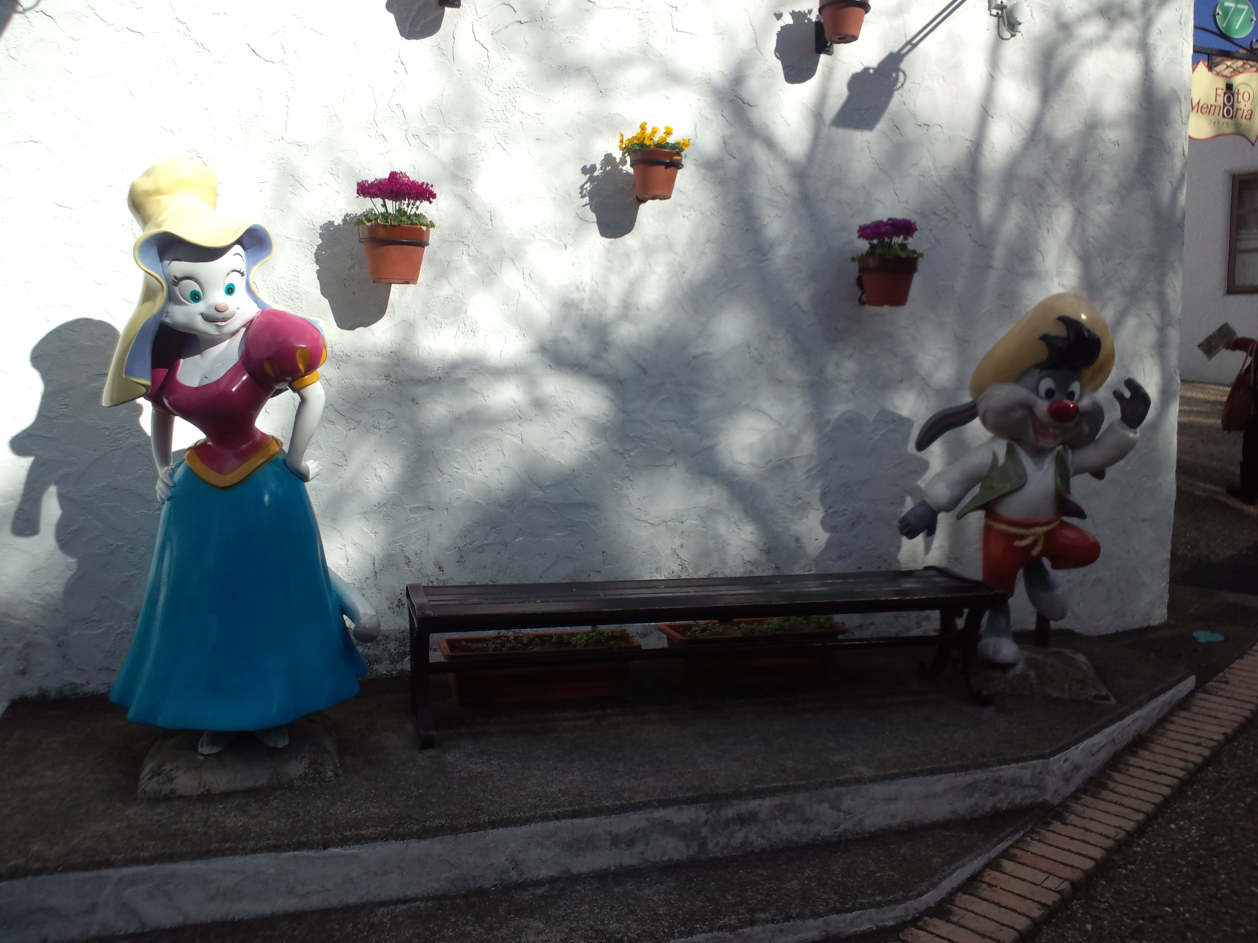 志摩スペイン村、パルケエスパーニャ イメージキャラクター・ダルとチョッキー